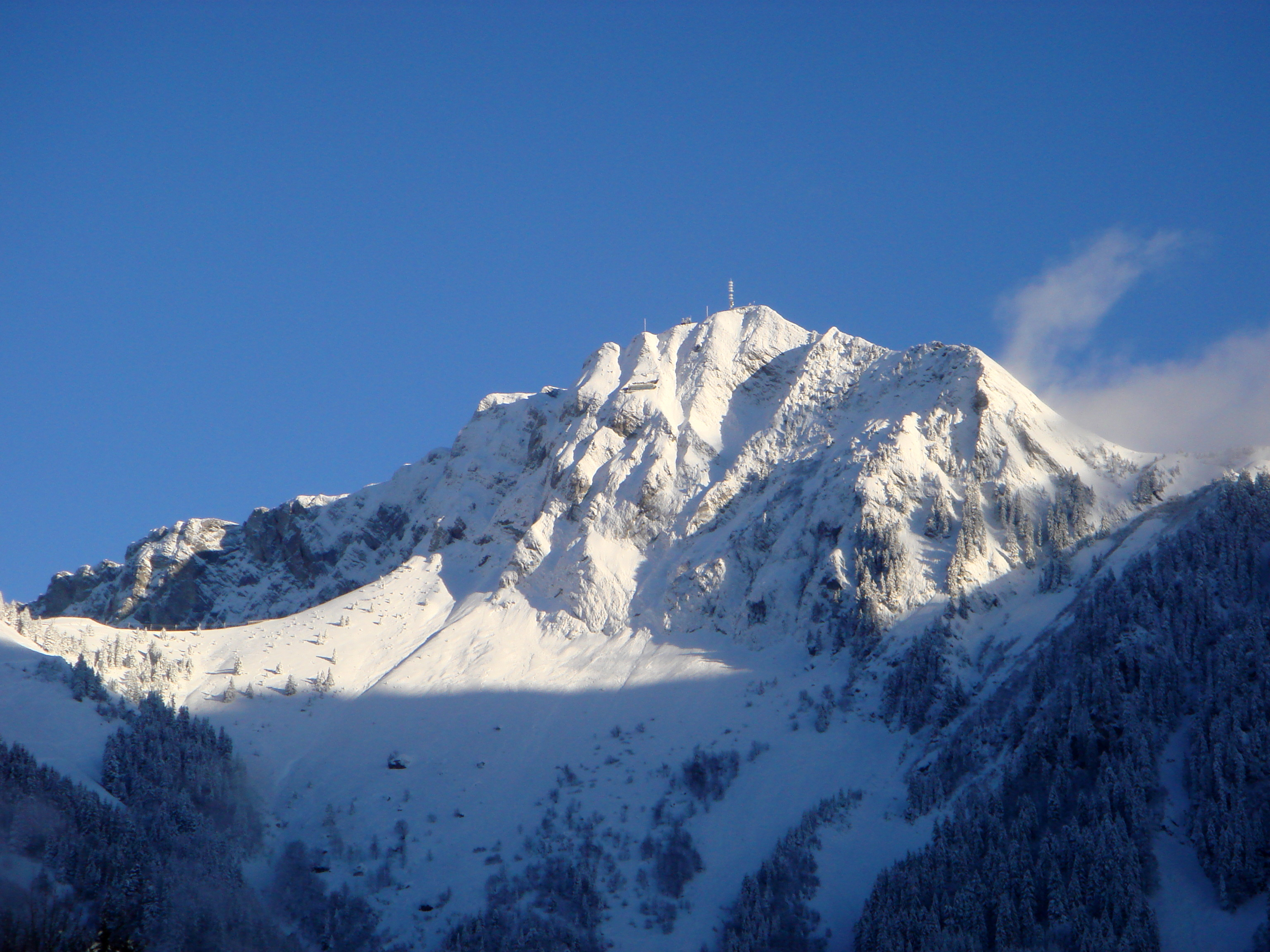 Les Rochers de Naye en hiver vus depuis Caux